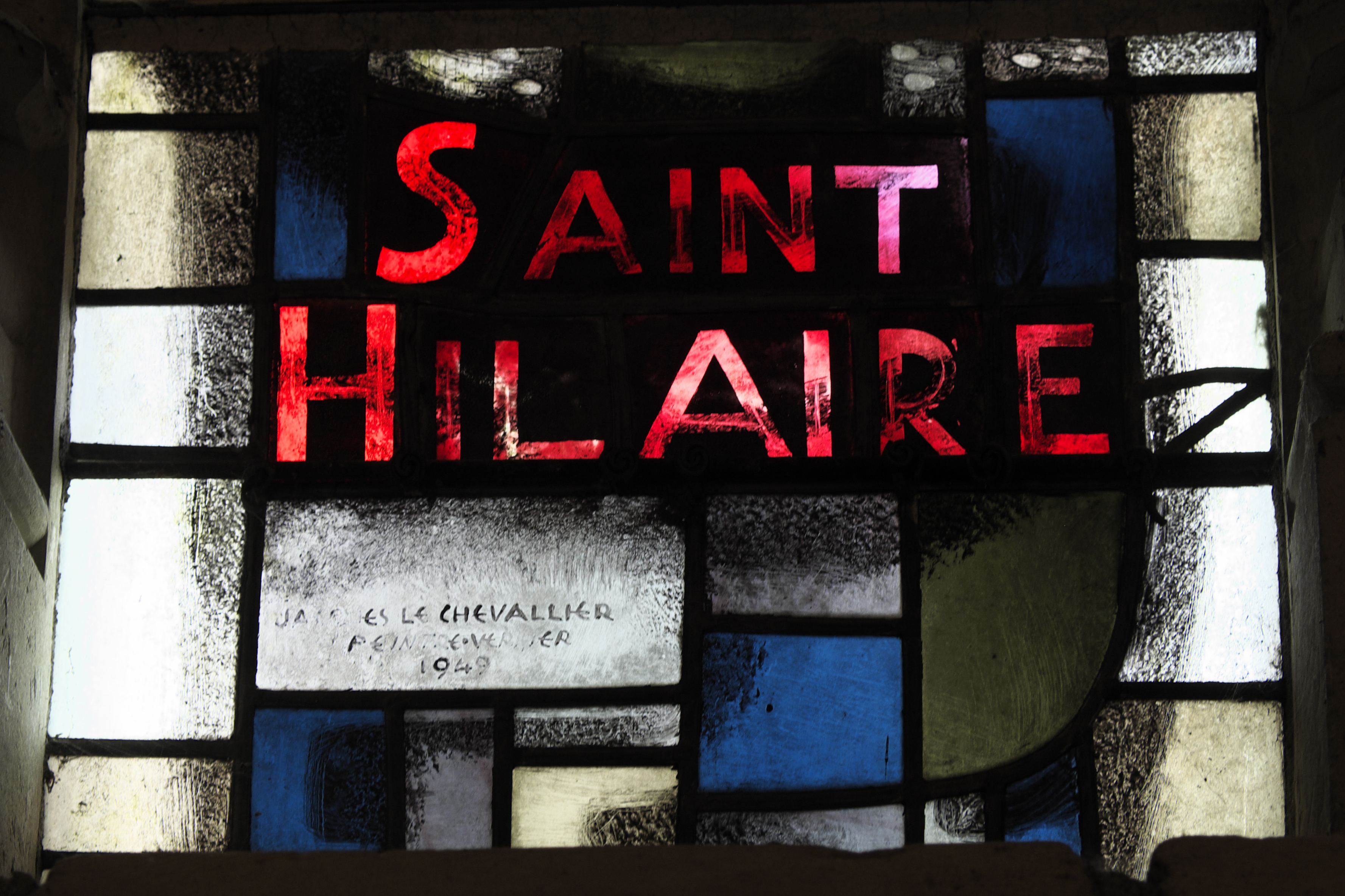 Katholische Pfarrkirche Notre-Dame in La Roche-Posay im Département Vienne (Nouvelle-Aquitaine/Frankreich), Bleiglasfenster mit der Signatur: JACQUES LE CHEVALLIER PEINTRE VERRIER 1949